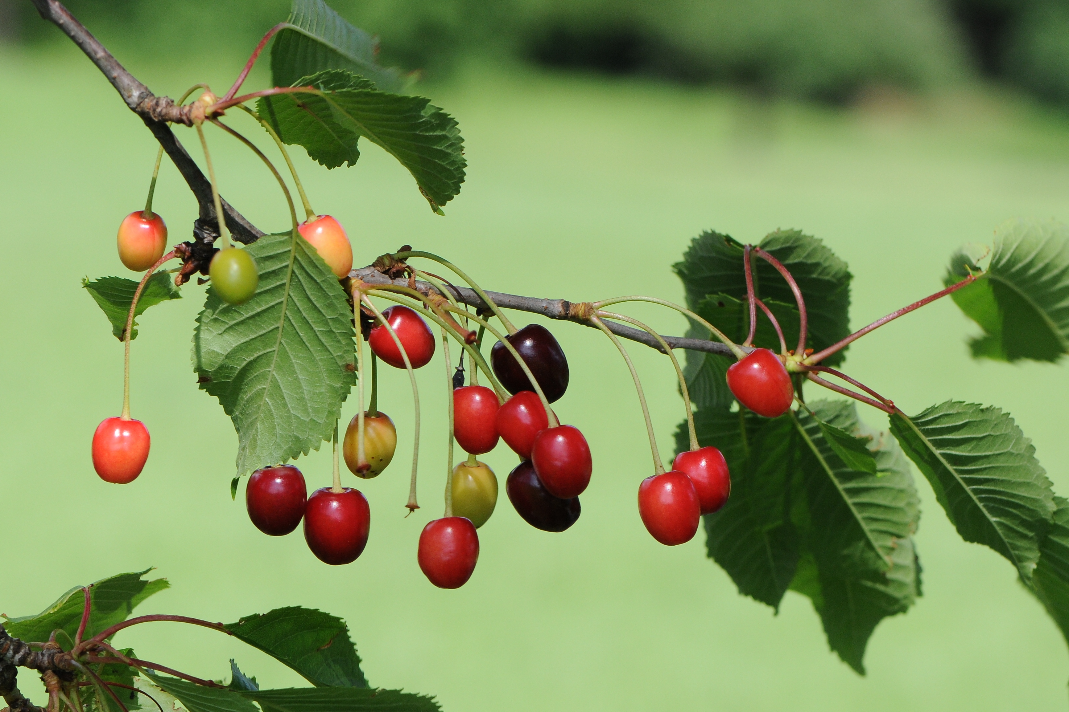 Die Sauerkirsche oder Weichselkirsche, in Österreich oft kurz Weichsel genannt, (Prunus cerasus) ist eine Pflanzenart aus der Familie der Rosengewächse (Rosaceae). Sie wird als Obstbaum genutzt. Gesehen in Fraxern.